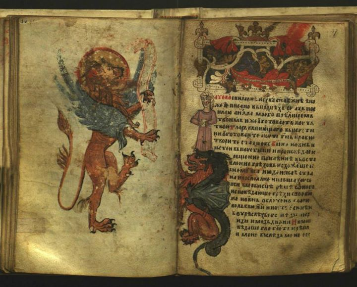 Никољско јеванђеље XIV вијек. Данас се налази у Библиотеци у Даблину. Преузето са